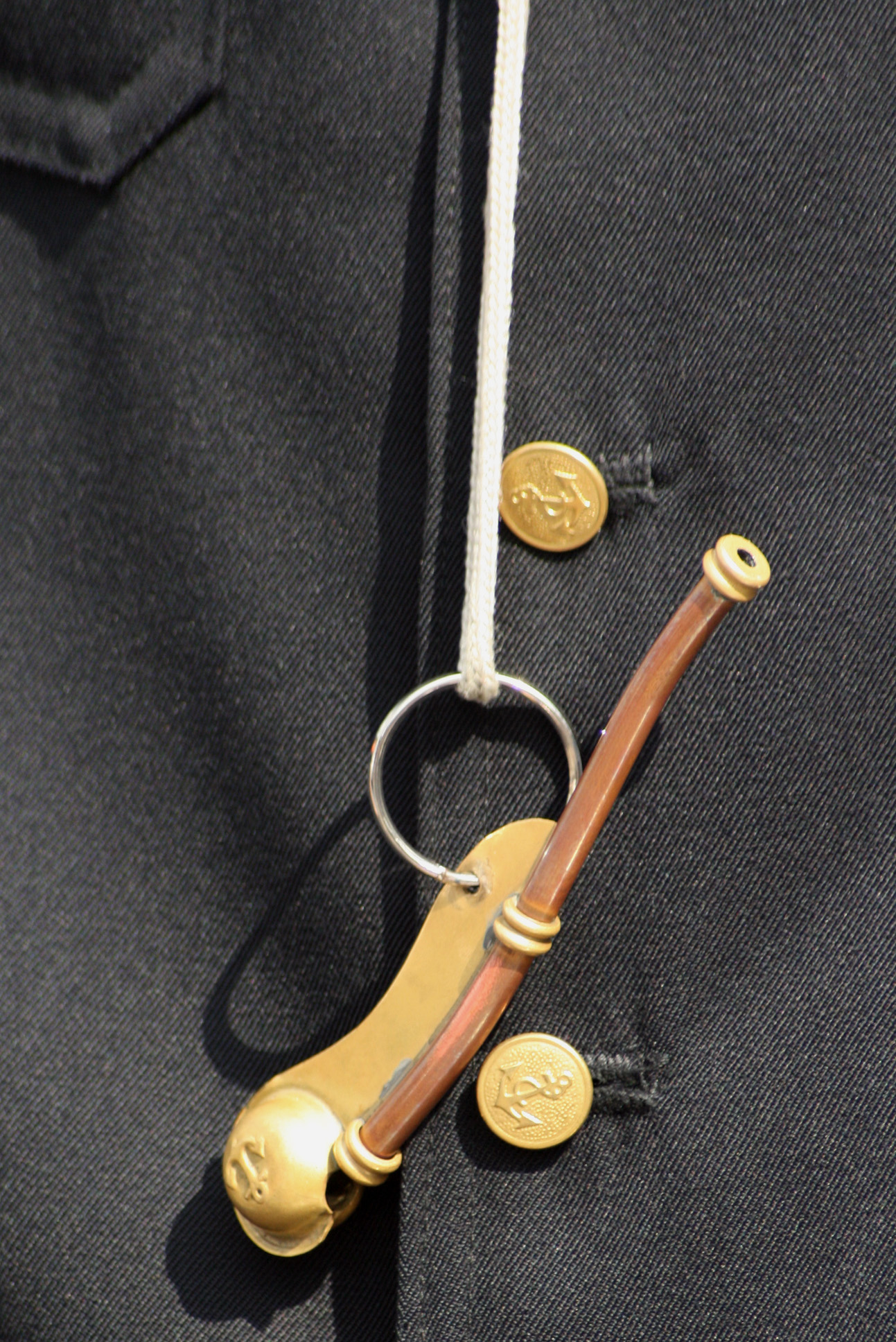 Gwizdek bosmański, The Tall Ships' Races, Szczecin 2007